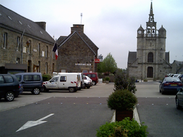 La mairie et l'église de Lézardrieux Mai 2006 Michel LEFF